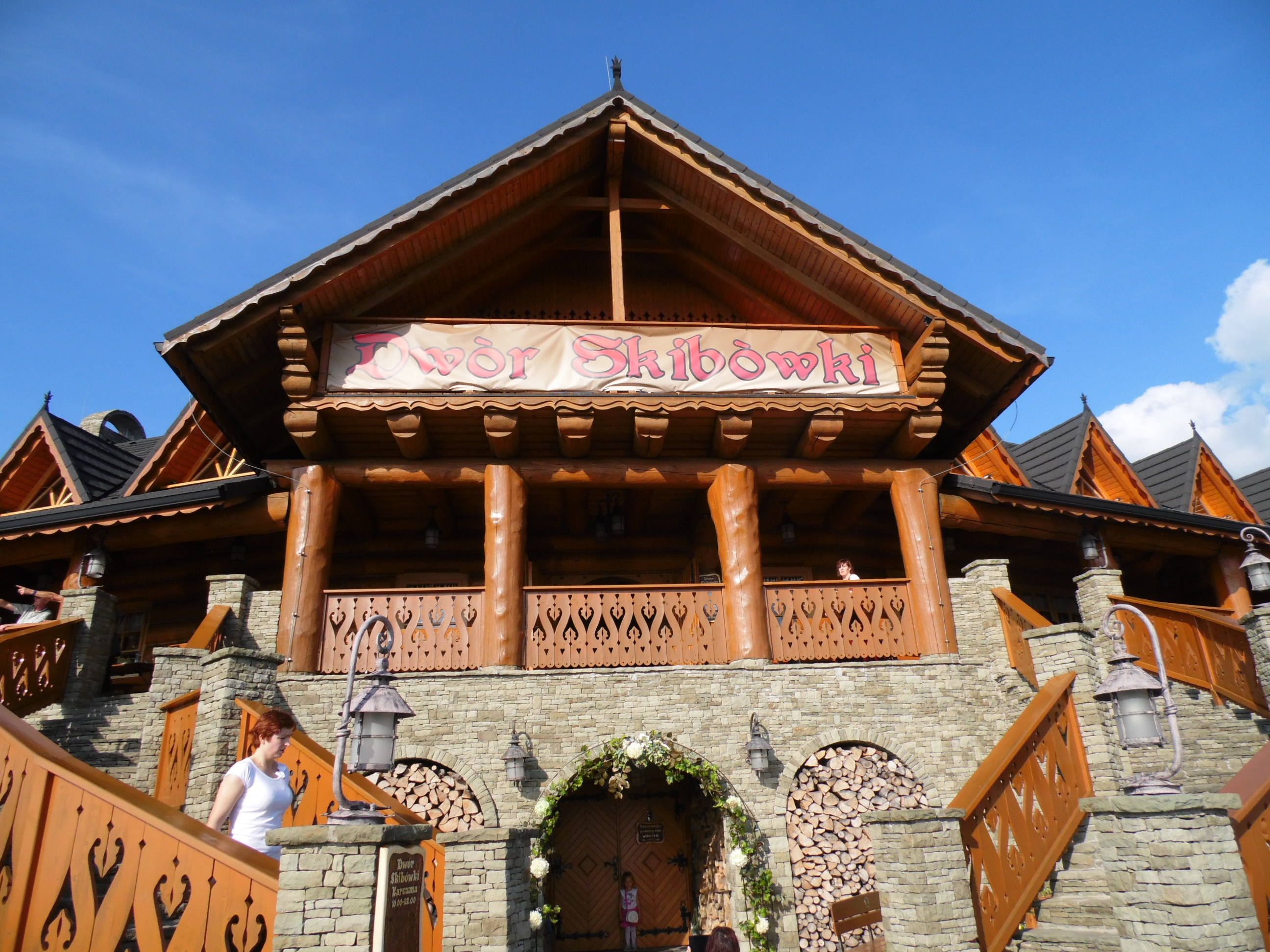 RÓWNICA. KARCZMA DWÓR SKIBÓWKI.